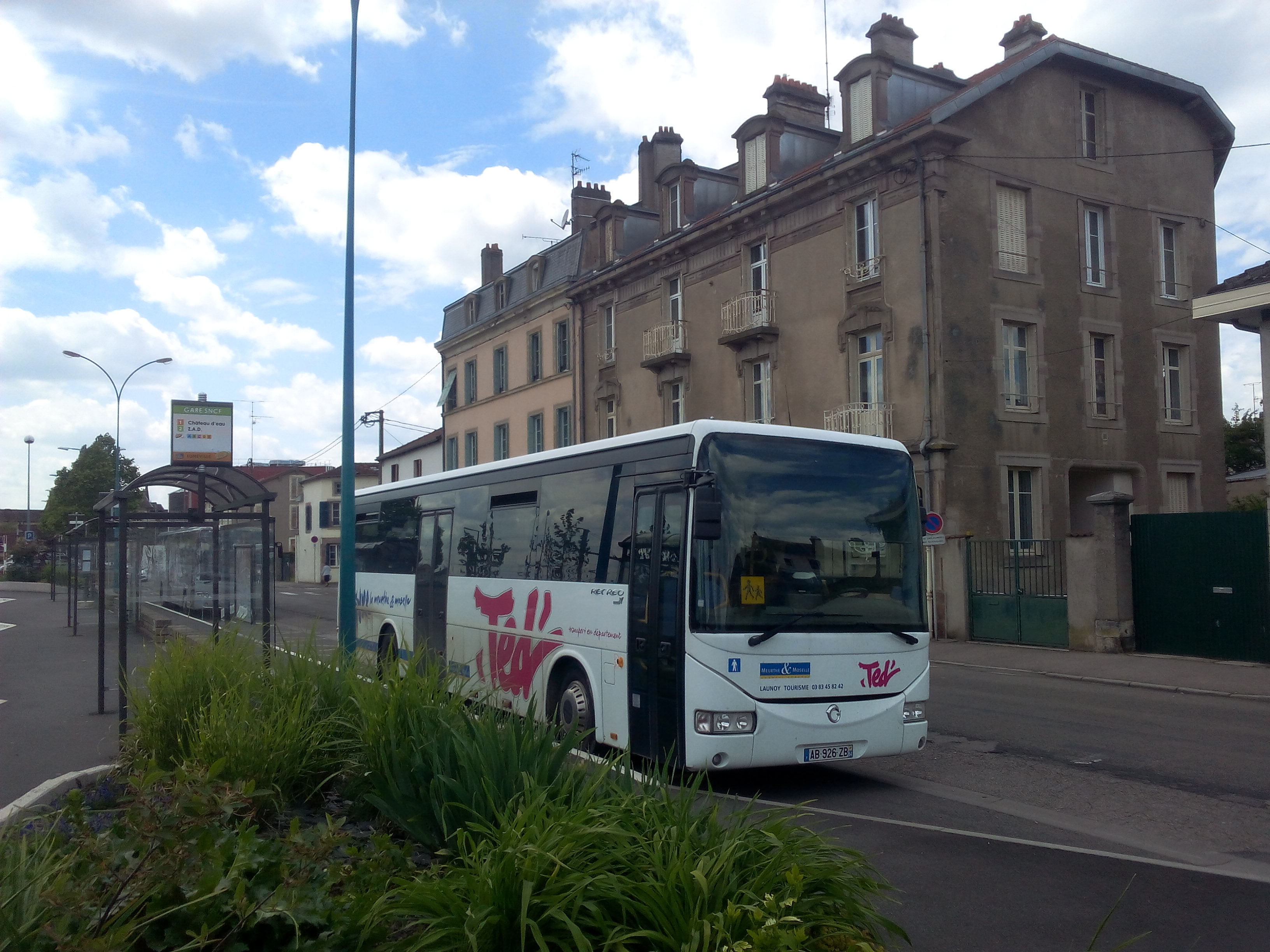 Autocar du réseau départementale à Lunéville